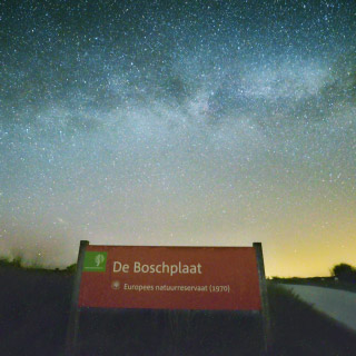 De Melkweg boven Dark Sky Park "De Boschplaat" mei 2017 - Milky Way above International Dark Sky Park "De Boschplaat" Netherlands in May 2017.